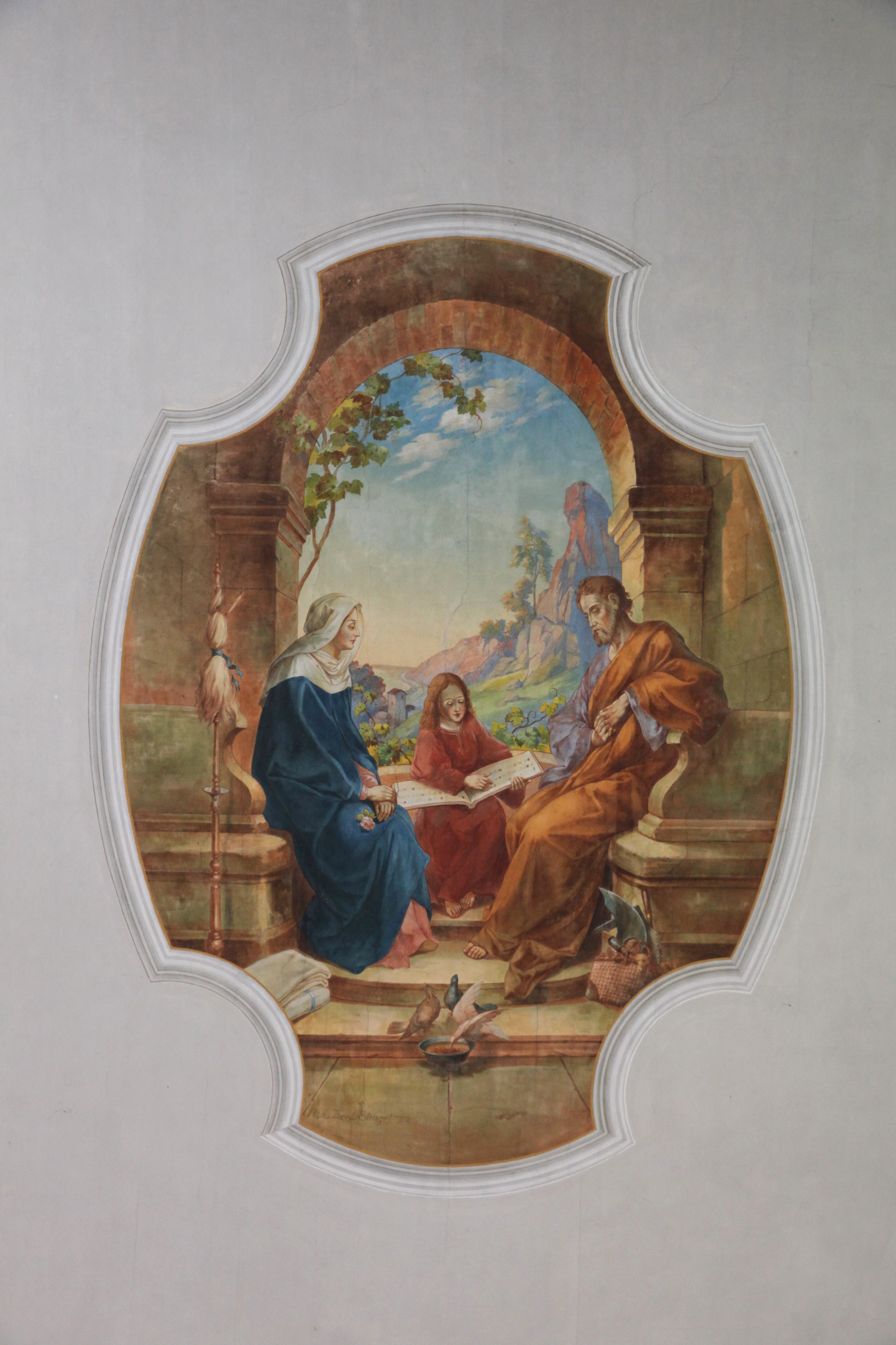 Katholische Pfarrkirche St. Wolfgang in Kaltenbrunn, Gemeinde Itzgrund: Deckengemälde